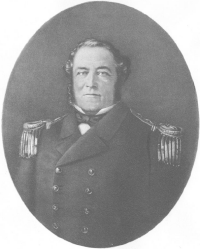 John Williams Wilson. Portrait von 1867.